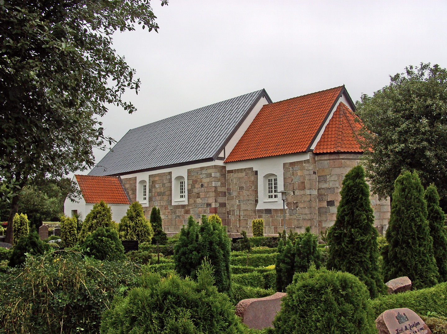 fra sydøst